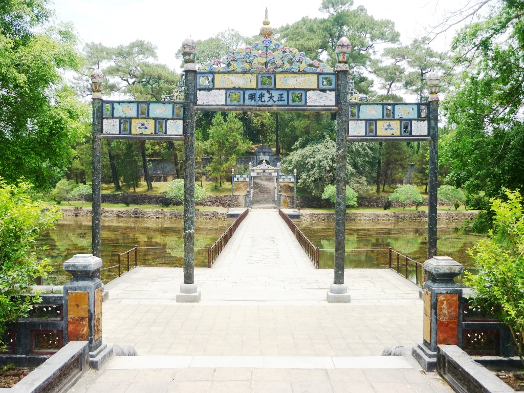 Thể loại:Nhà Nguyễn Thể Loại:Di tích cố đô Huế Thể loại:Lăng tẩm các Vua chúa Nguyễn Thể loại:Di tích ngoài Kinh Thành Huế